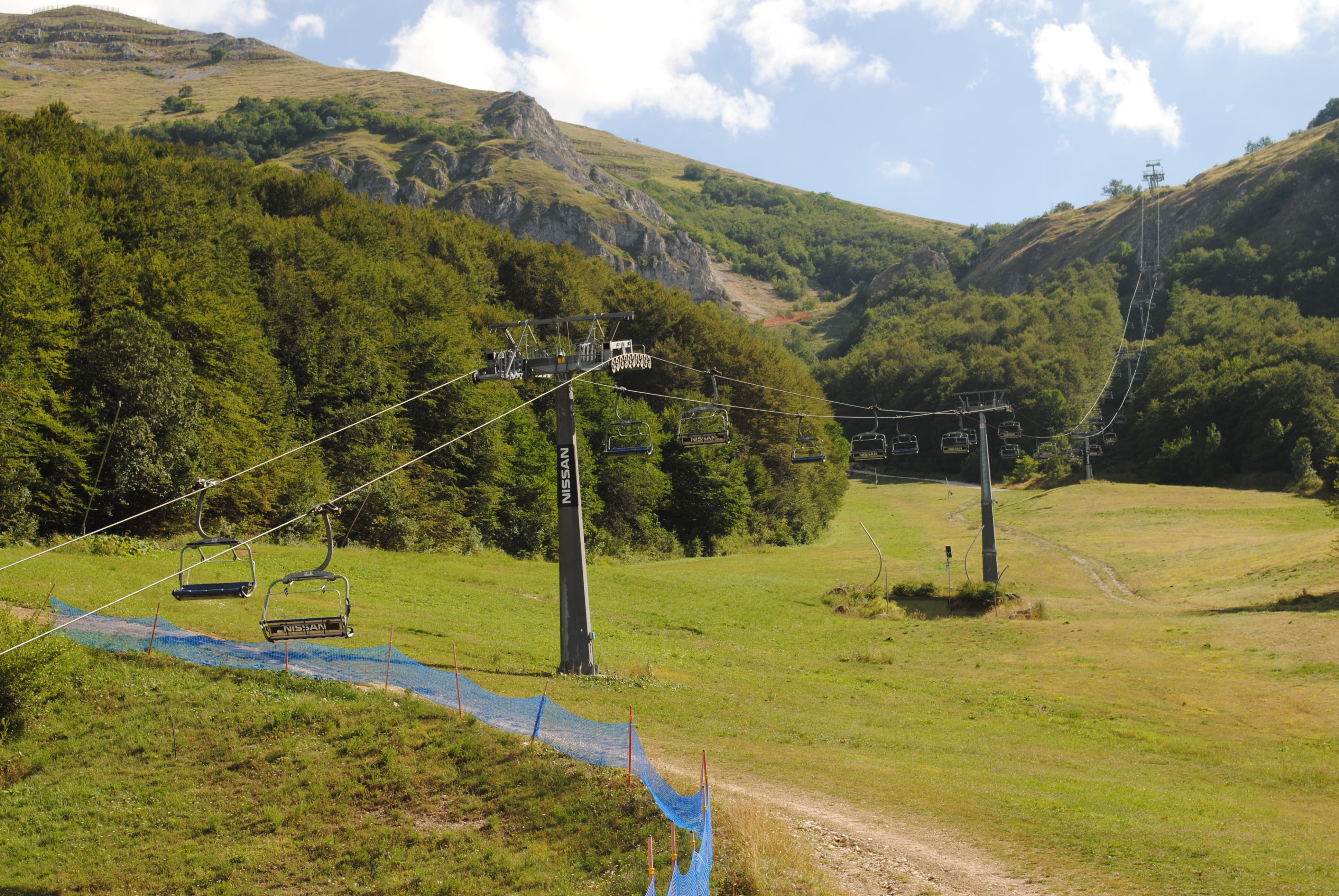 Impianto sciistico di Campo Felice in Abruzzo, Italia. La seggiovia è un impianto che trasporta le persone al punto dove cominciano le piste di discesa. In estate l'impianto viene uato per lo Down Hill in Mountain Buke.